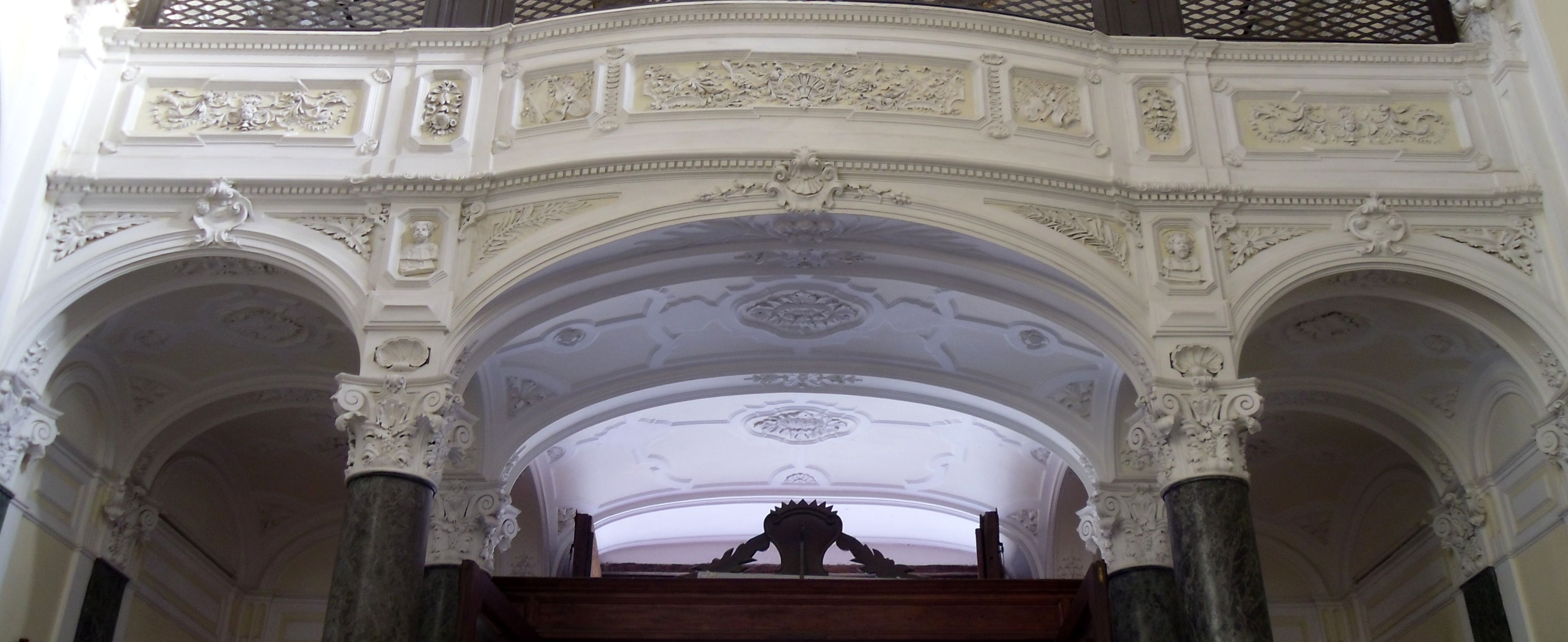 La cantoria, in pieno stile barocco, ospita un organo a canne settecentesco acquistato sotto l'apostolato del parroco Giuseppe Calvanese dalla chiesa di Pugliano. Sulla mostra vi sono dipinte le sigle AGP e GCP.